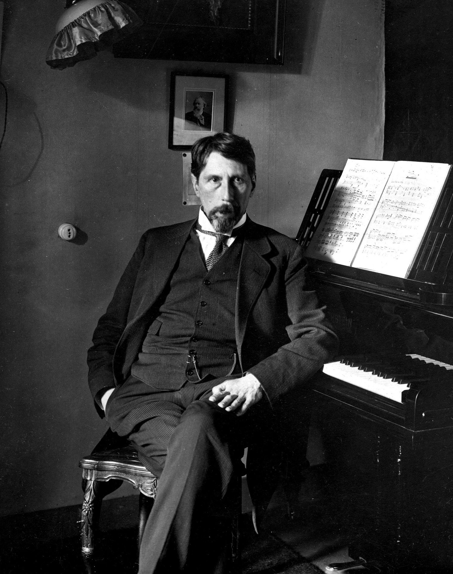 Componist Johan Wagenaar voor de vleugel die hij van bewonderaars kreeg voor zijn vijftigste verjaardag, 1912.